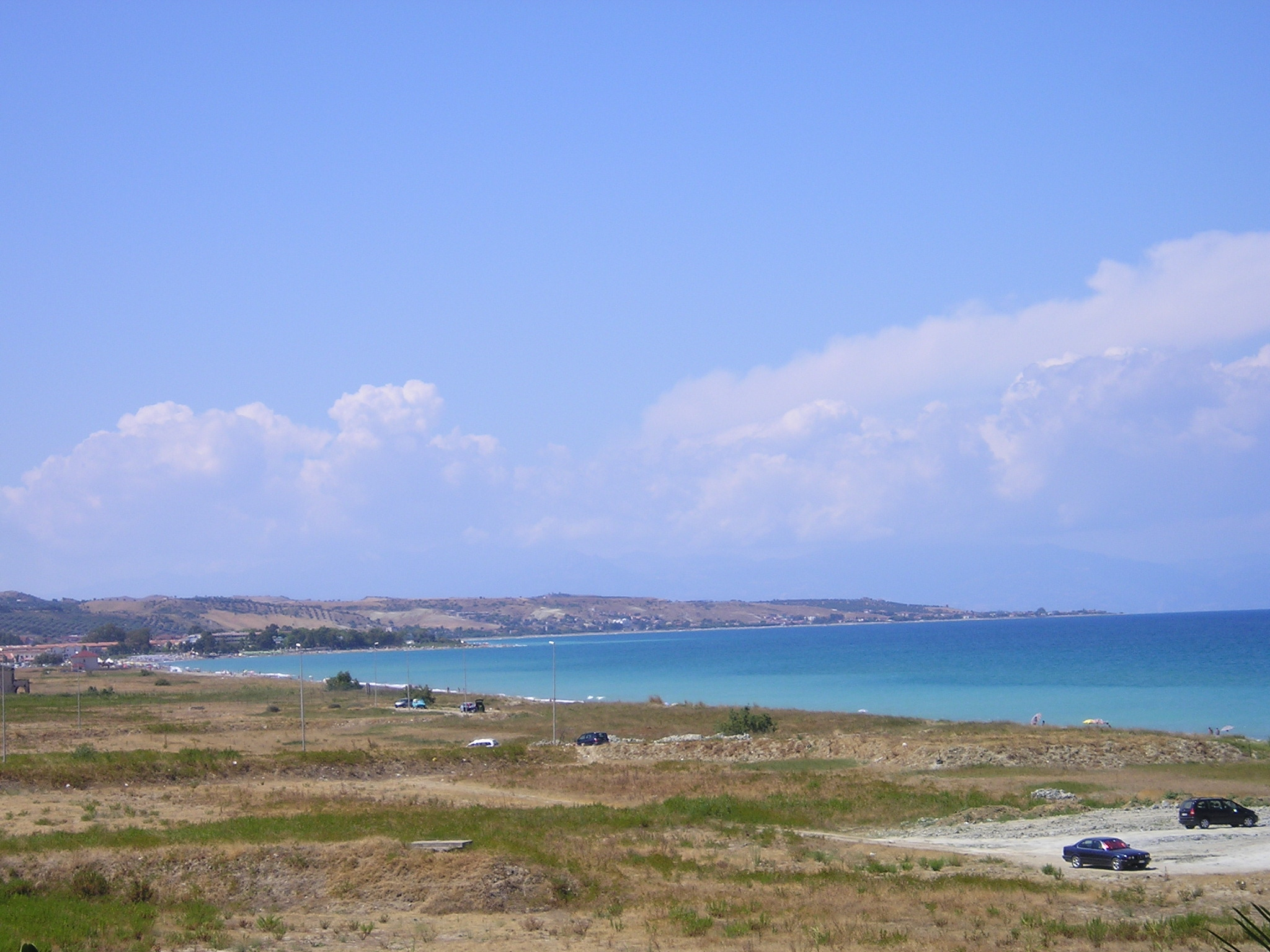 L'autore di quest'immagine è l'utente Gand, che la lascia nel pubblico dominio.